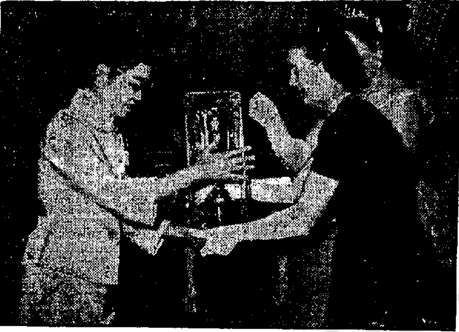 西區婦女會閨秀劇團兩次義演籌款於利舞台戲院舉行，歧樂嘉夫人（右）頒獎予冠軍李何笑瓊（左）。